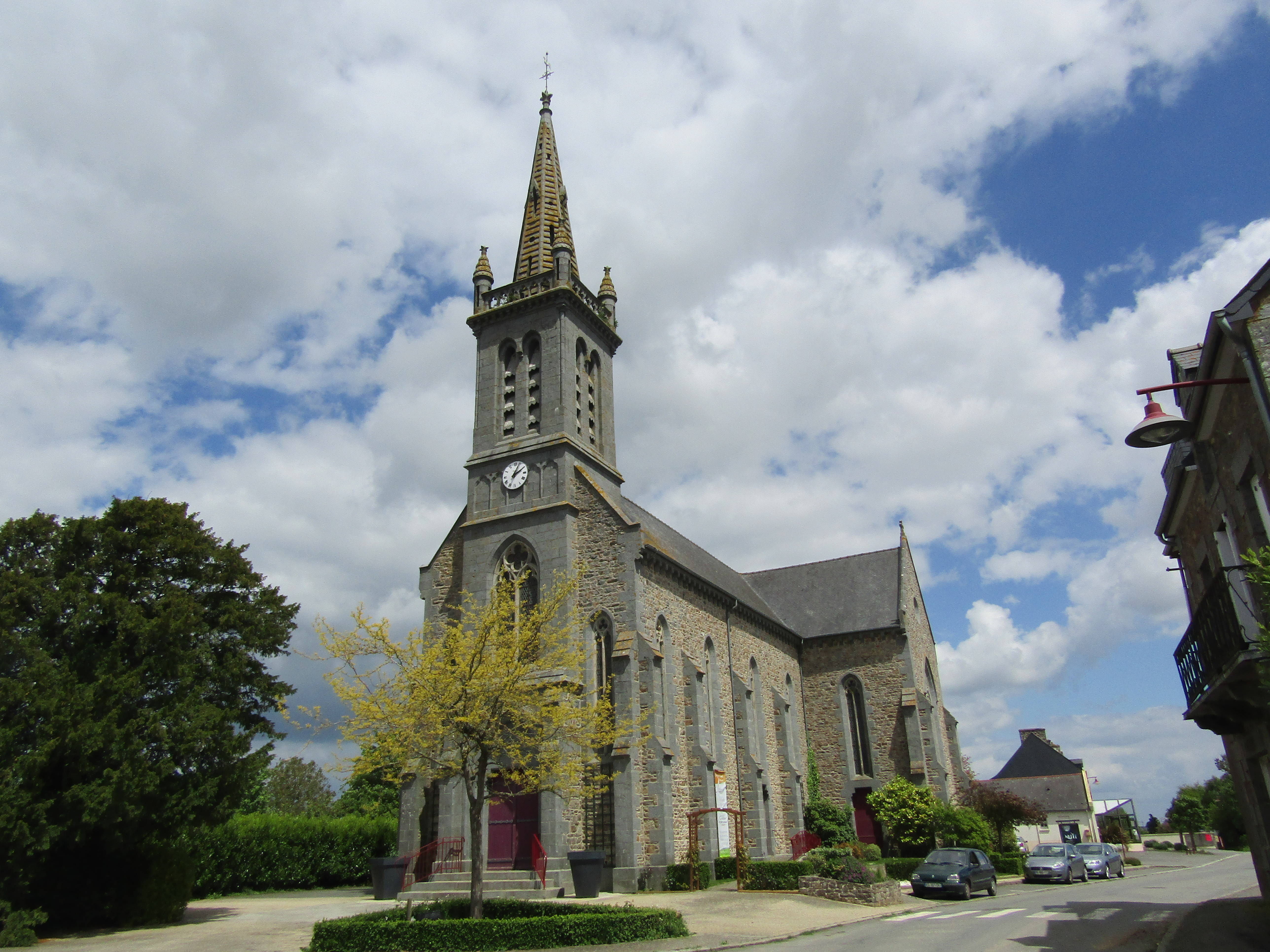 Eglise Saint-Sébastien de Rouillac (22)